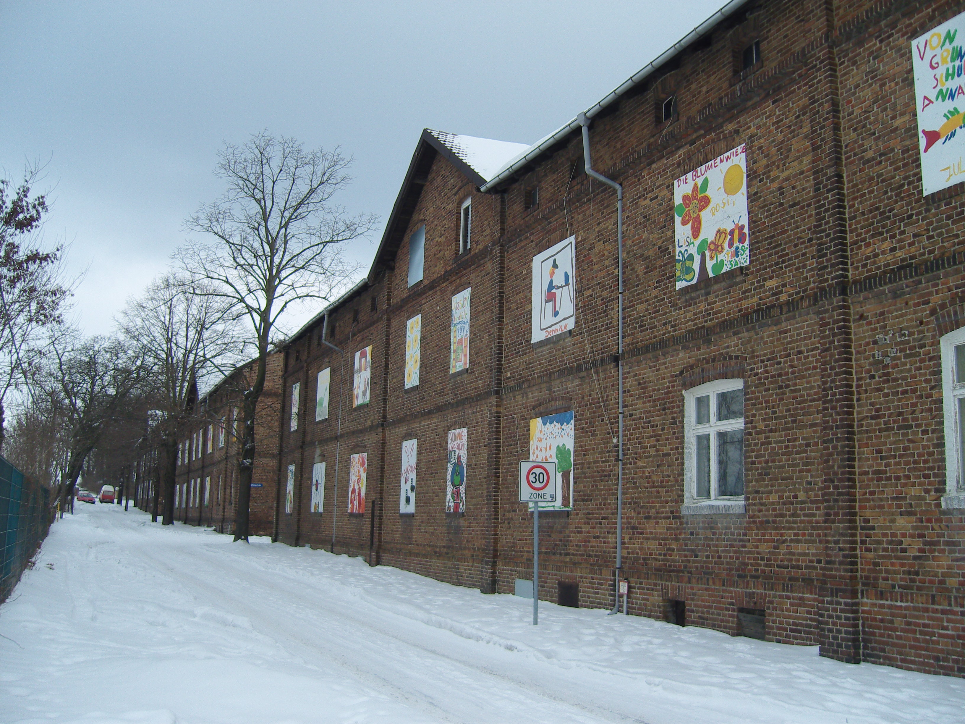 Wohnhäuser in der Glashüttenstraße in Annahütte, Teil der denkmalgeschützten Glasarbeitersiedlung